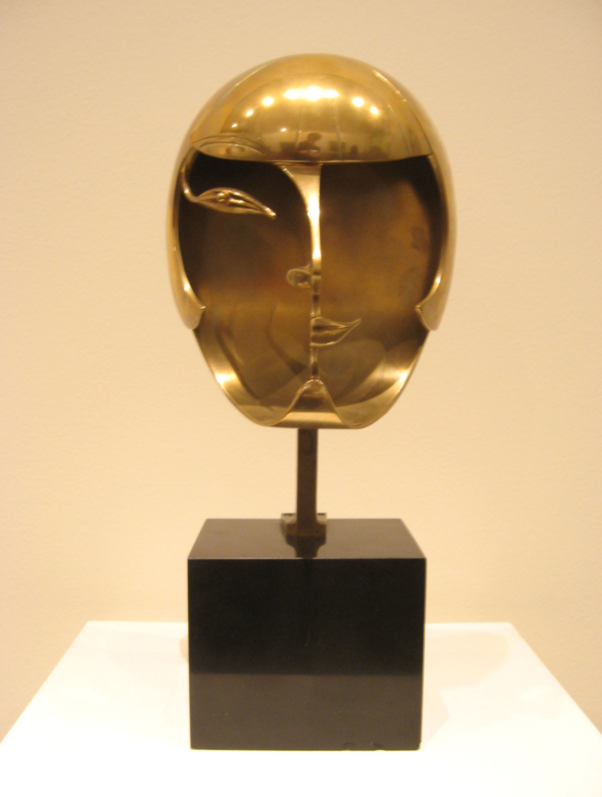 Kiki de Montparnasse (1928) by Pablo Gargallo (1881 - 1934). Bronze. Front view. Musée de Louvre.